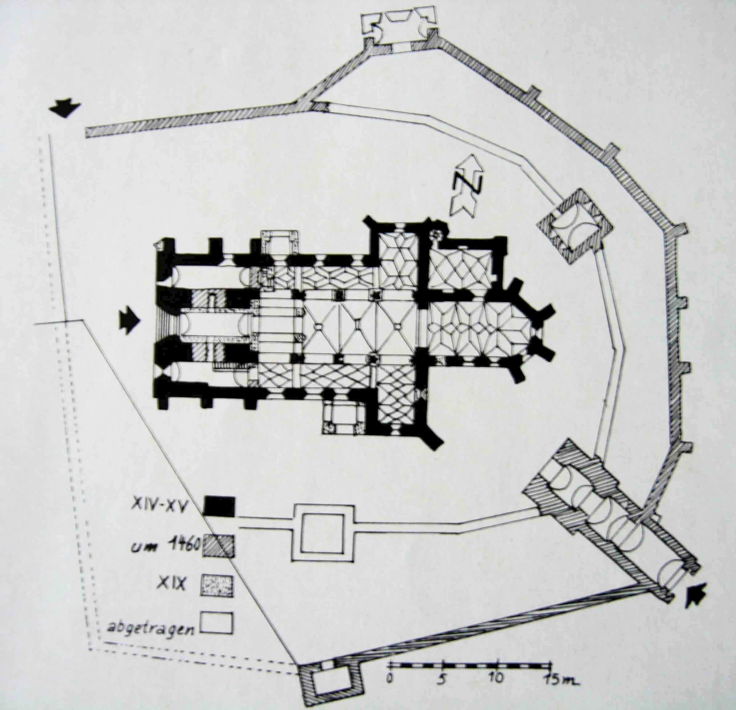 Planul ansamblului fortificat de la Atel